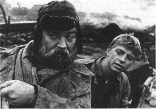 Кадр з фільма "Цераз могілкі"